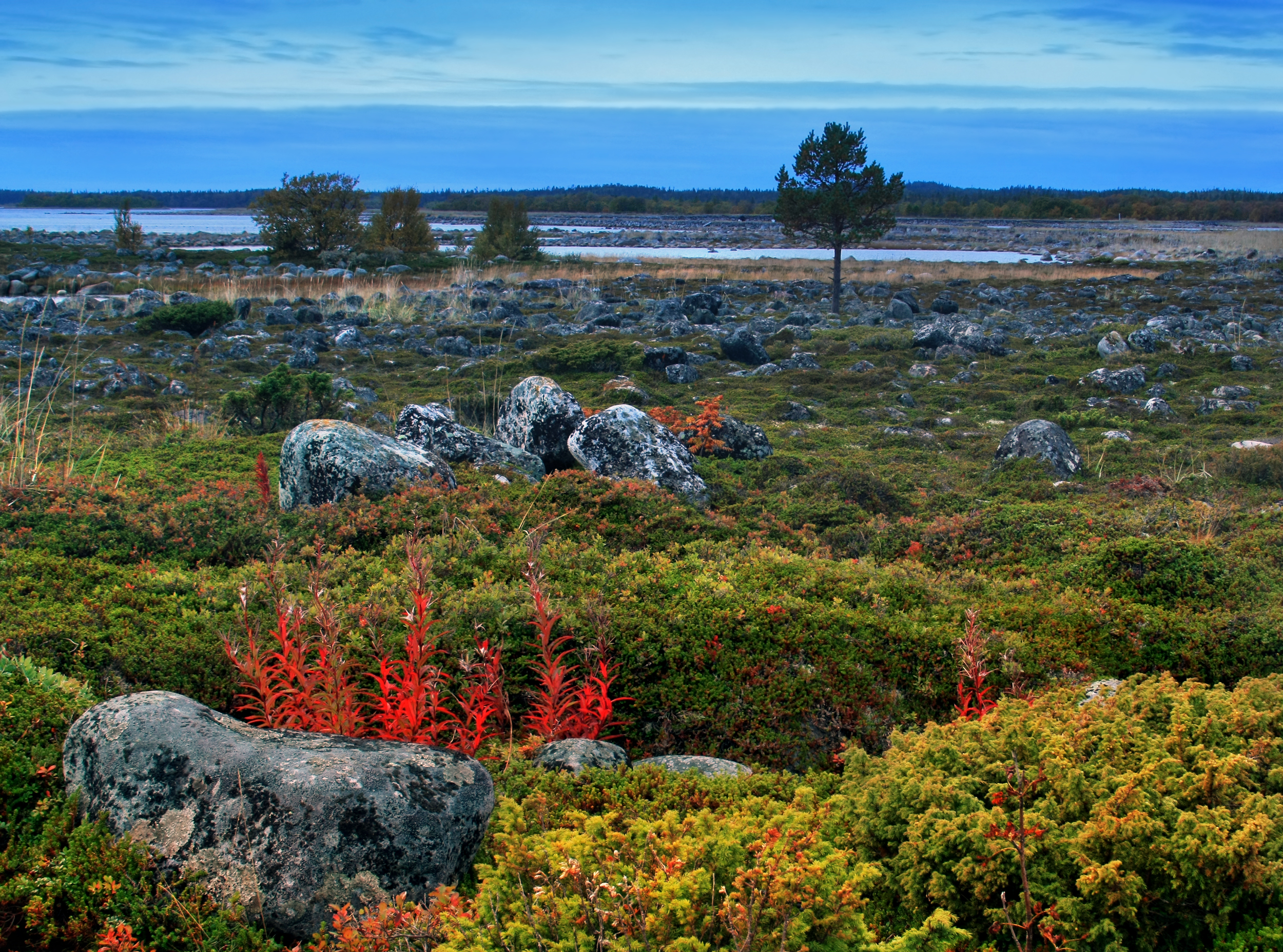 Vaade sügisesele tundravaibale